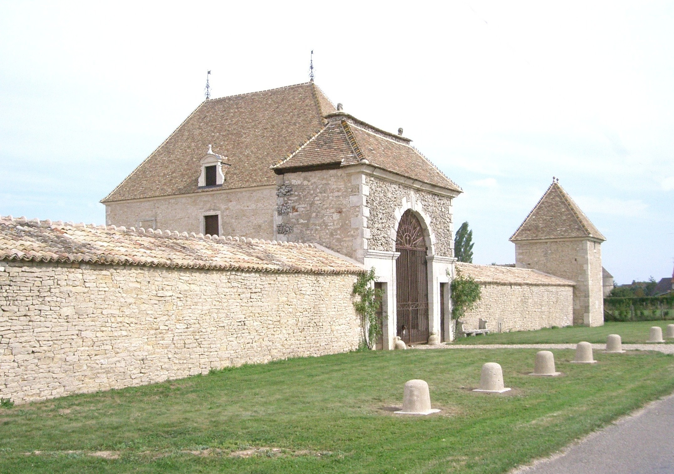 petit château de Massé à Corcelles-les-Arts en Côte d'Or France (porche - XVIIe siècle)